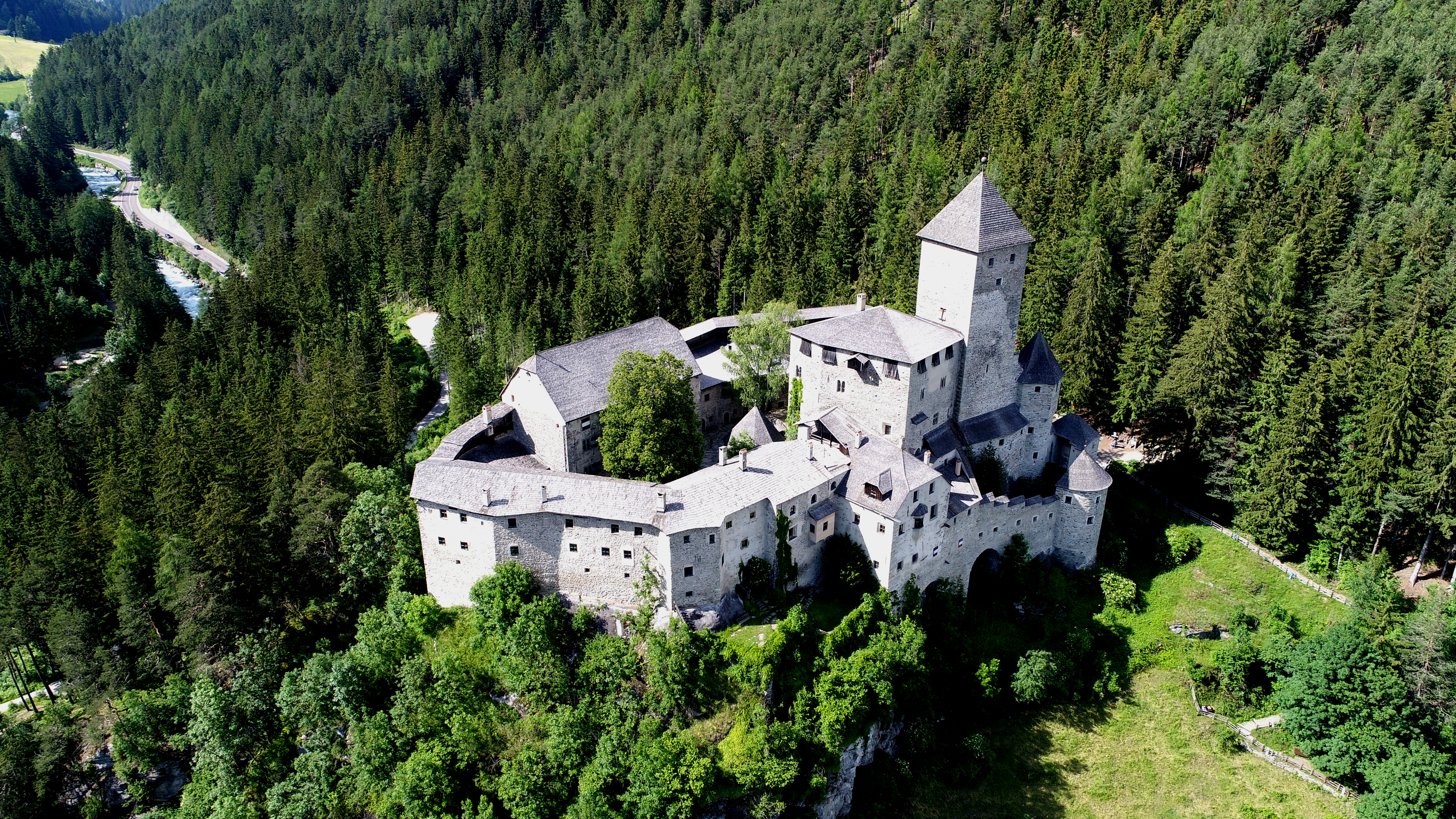 Burg Taufersaus der Vogelperspektive (2018)